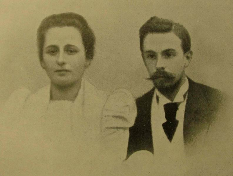 Вера и Александр Скрябин (единственная фотография вместе), взятая из групповой фотографии большой семьи Скрябиных в имении под городом Клин (Московской губернии) - и опубликованная в журнале "Музыкальный современник" Москва, 1916 года №4-5 (посмертный номер, посвящённый Скрябину)